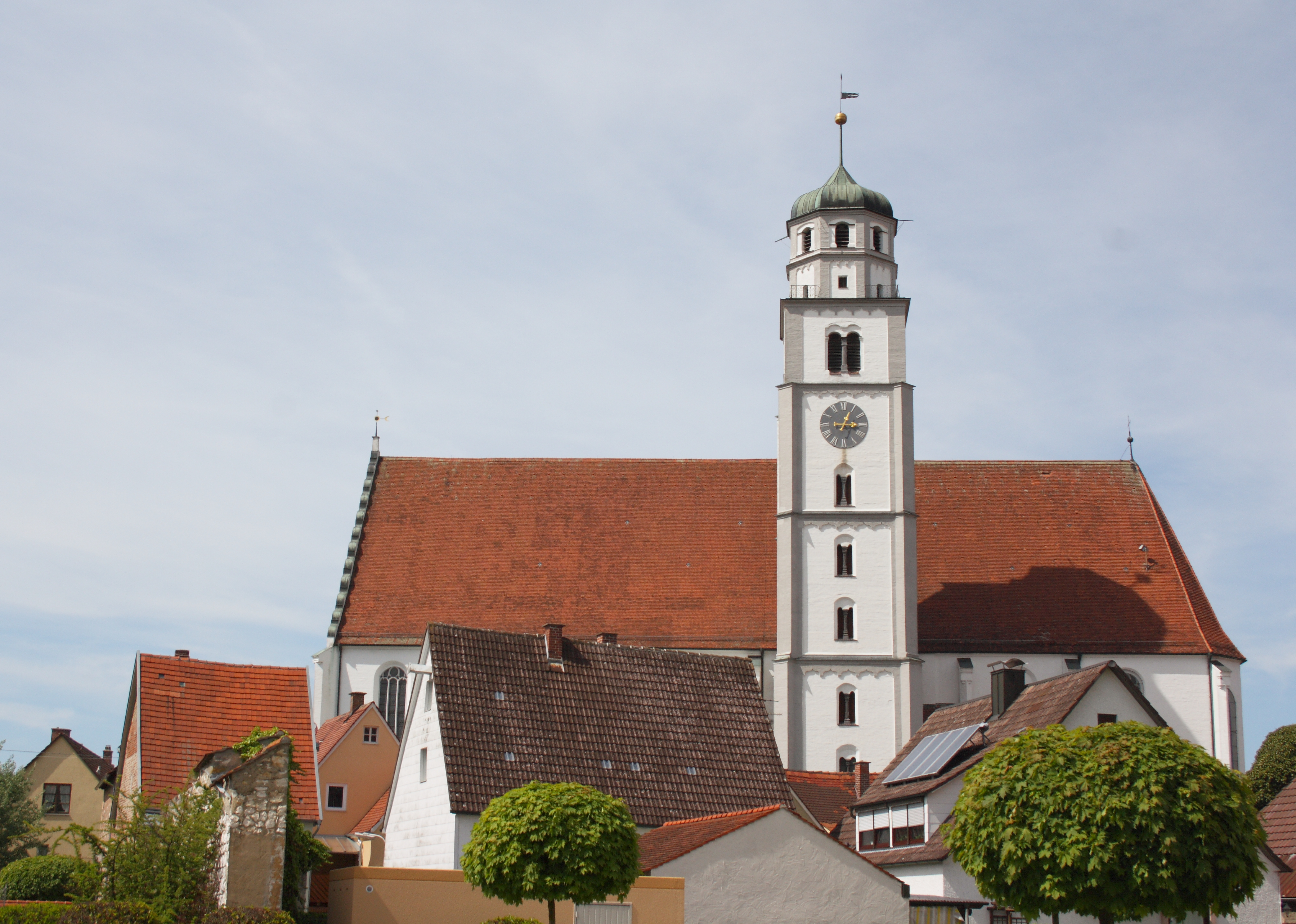 katholische Stadtpfarrkirche St. Martin in Lauingen im Landkreis Dillingen an der Donau (Bayern)